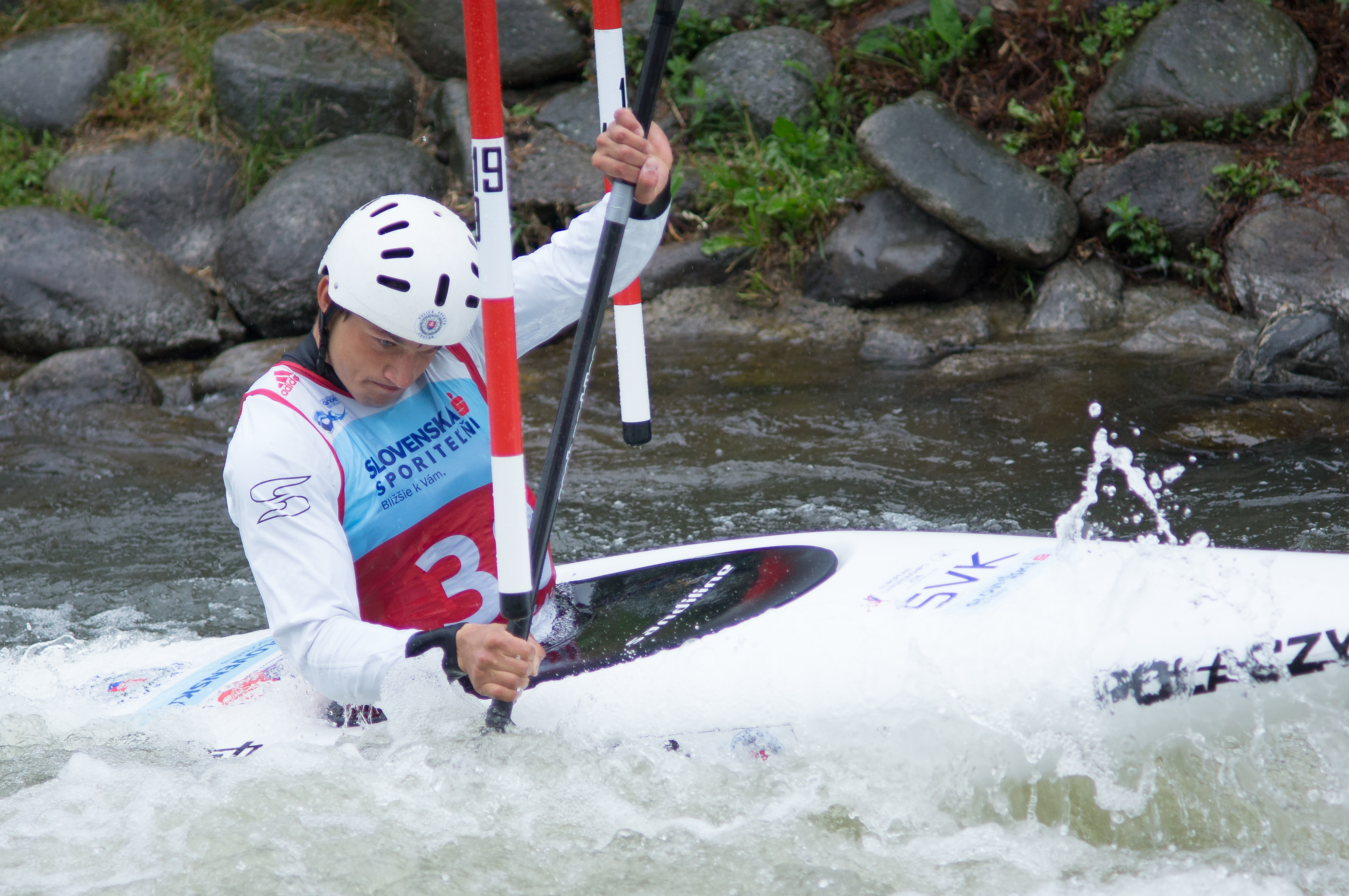 Andrej Málek